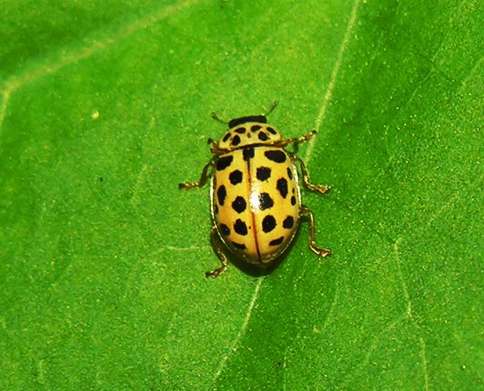 Devyniolikataškė boružė (Anisostica novemdecimpunctata) Šeima. Boružės (Coccinellidae) Foto: Algirdas, 2006 m. birželio 25 d., Lietuva